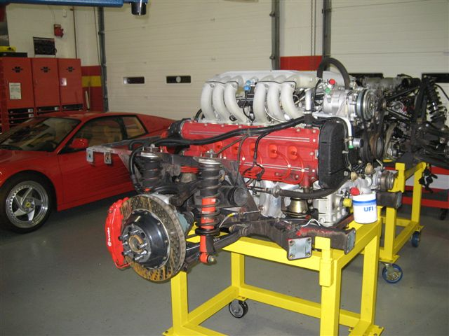 Ferrari Testarossa Engine